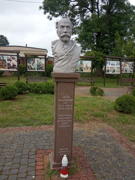 Pomnik Jacka Malczewskiego w Wielgiem